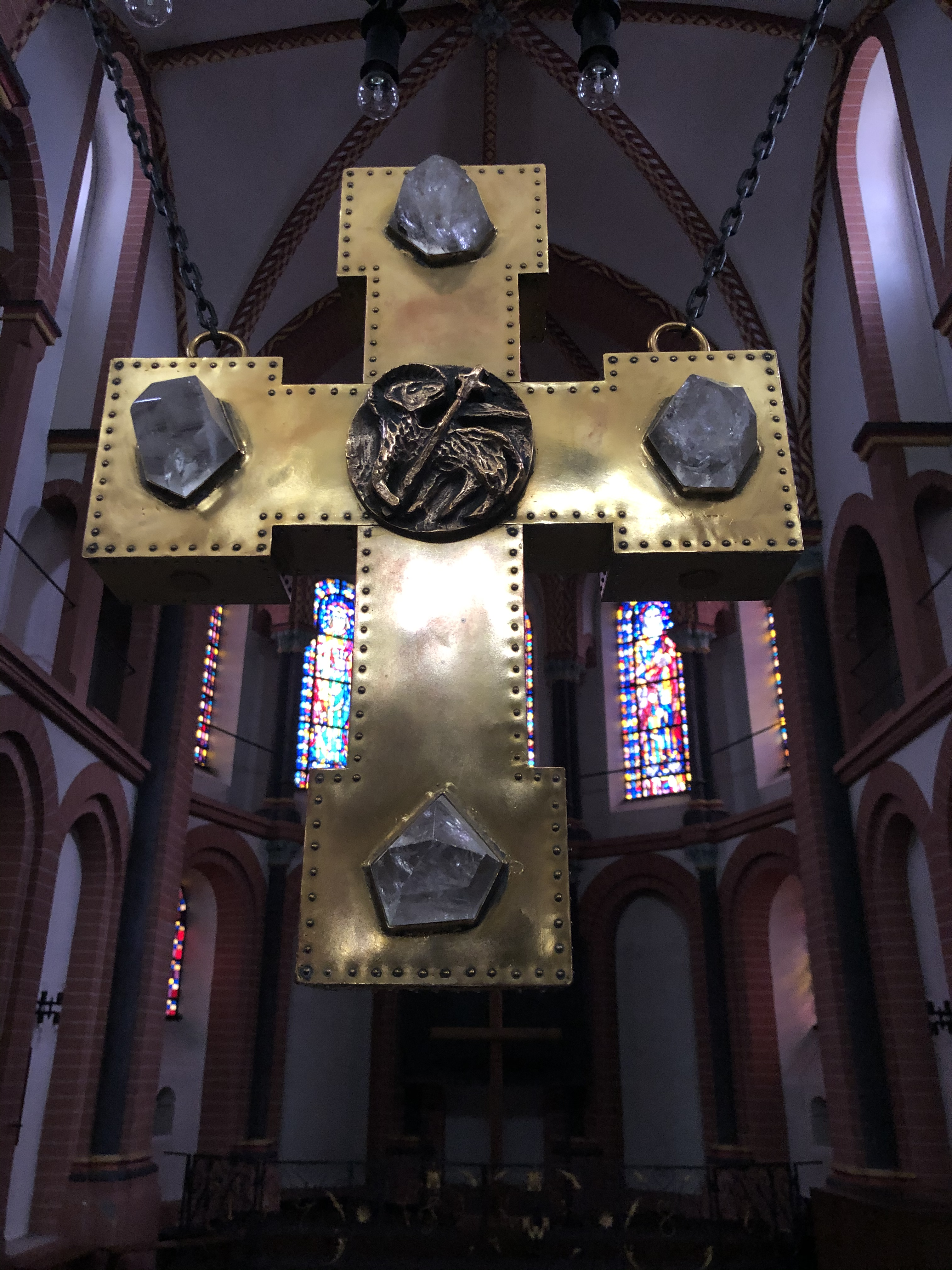 goldenes Kreuz mit Kristallen über dem Alter in St. Peter Sinzig am Rhein